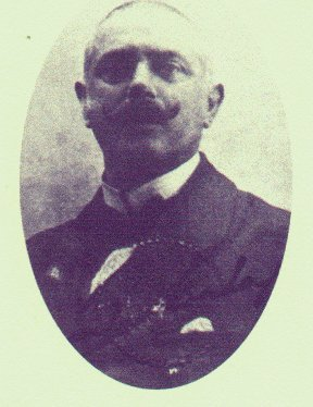 Foto di Pasquale Calapso